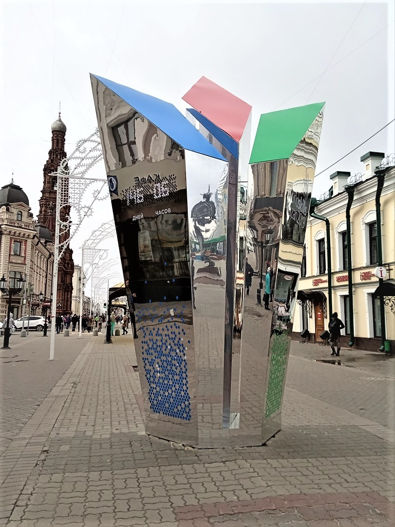 Стела, расположенная на улице Баумана в Казани и отсчитывающая дни до начала Чемпионата World Skills Казань 2019